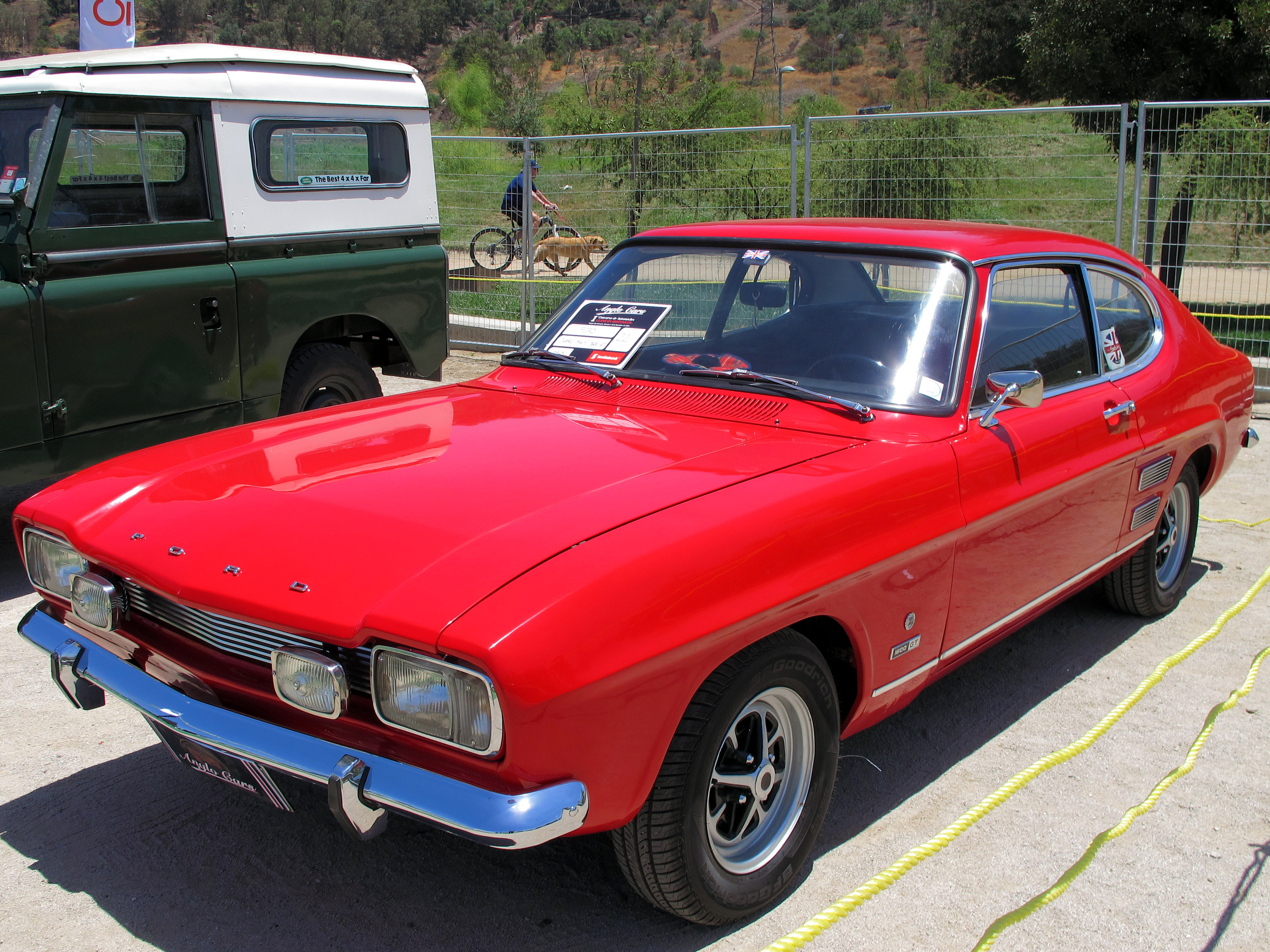 Ford Capri XL 1600 GT 1969